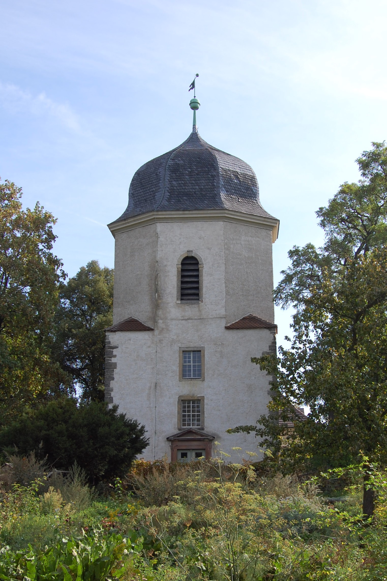 Turm der Sankt-Anna-Kirche in Dieskau